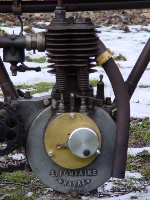 Toestemming van Yesterdays Antique Motorcycles (